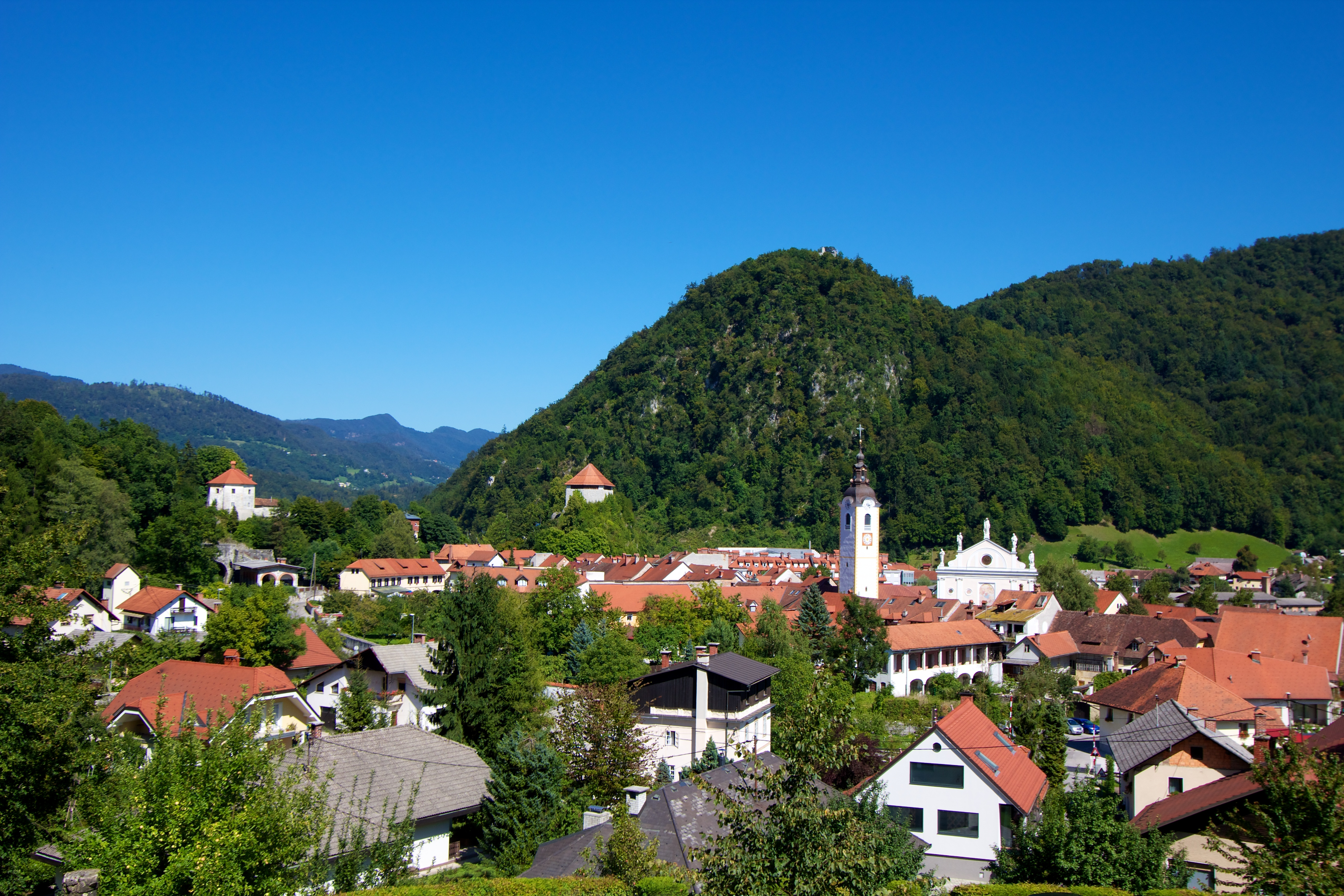 Kamnik 002